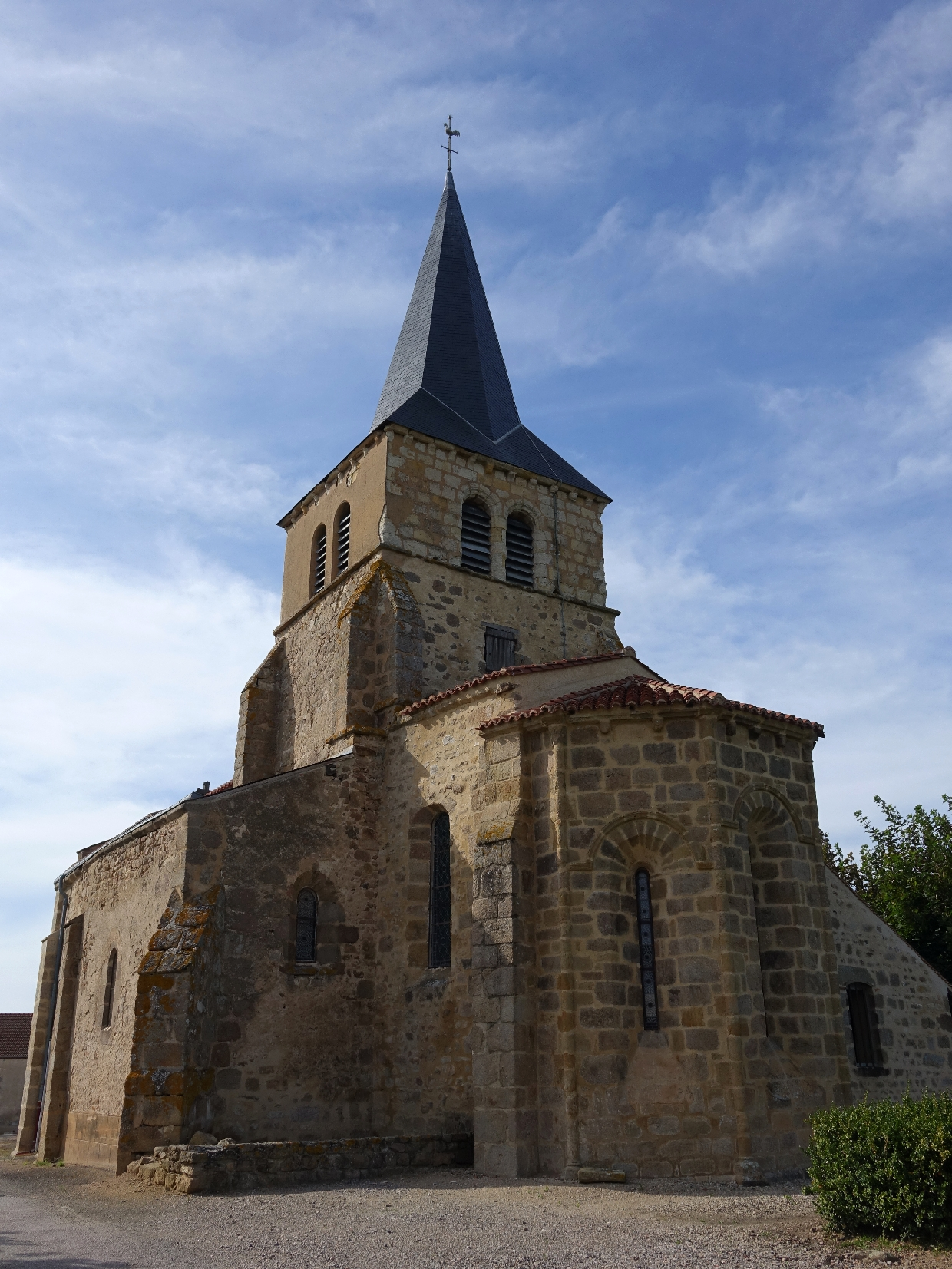 Église Saint-Laurent